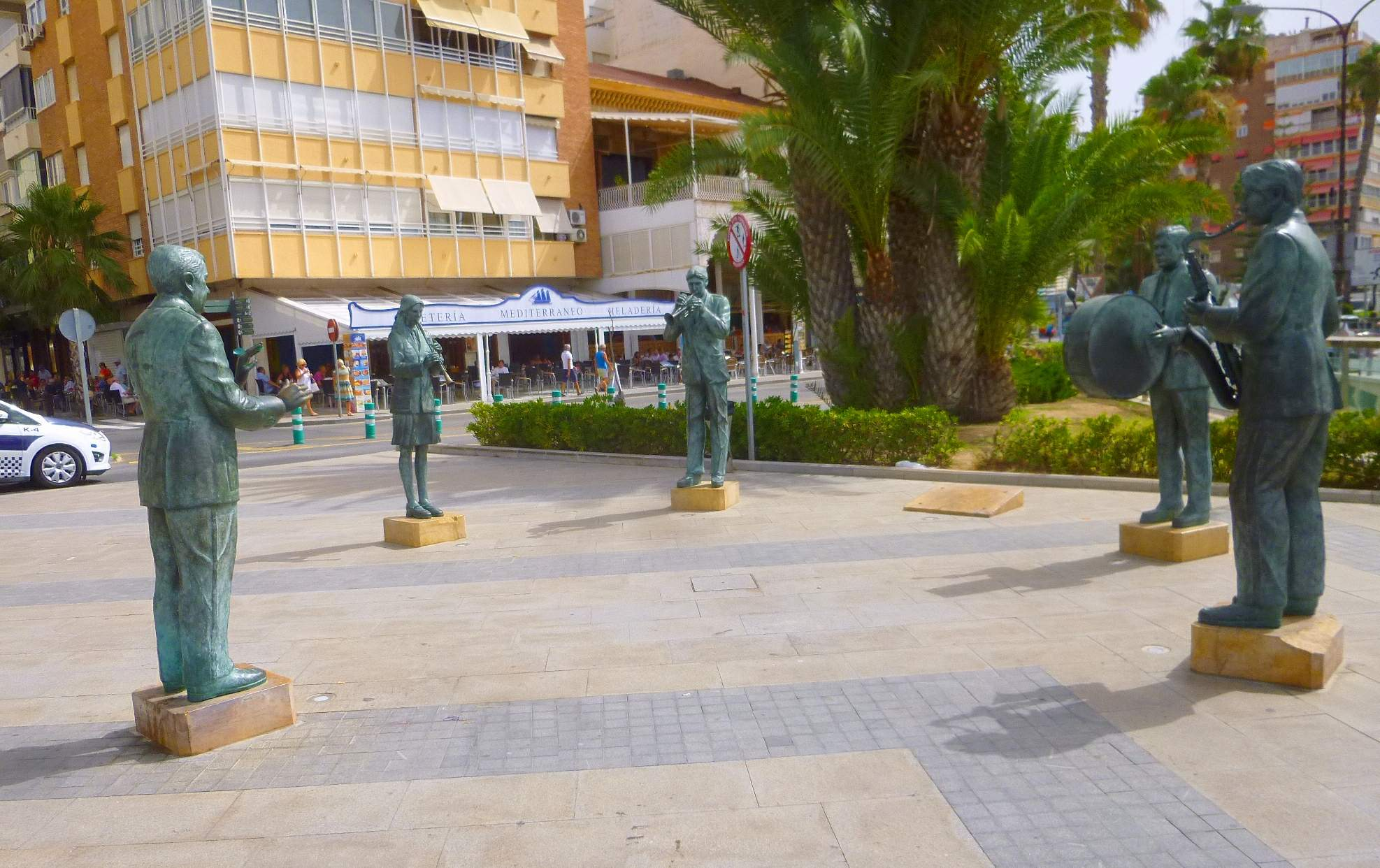 Torrevieja - Paseo de Vistalegre, Monumento a los Músicos Torrevejenses